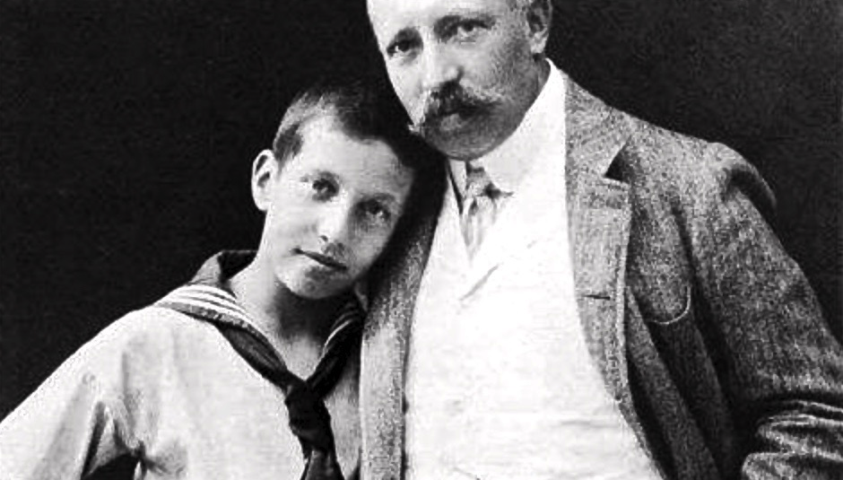 Der Verleger Samuel Fischer mit seinem Sohn Gerhart (1894–1913), der früh an Typhus starb.